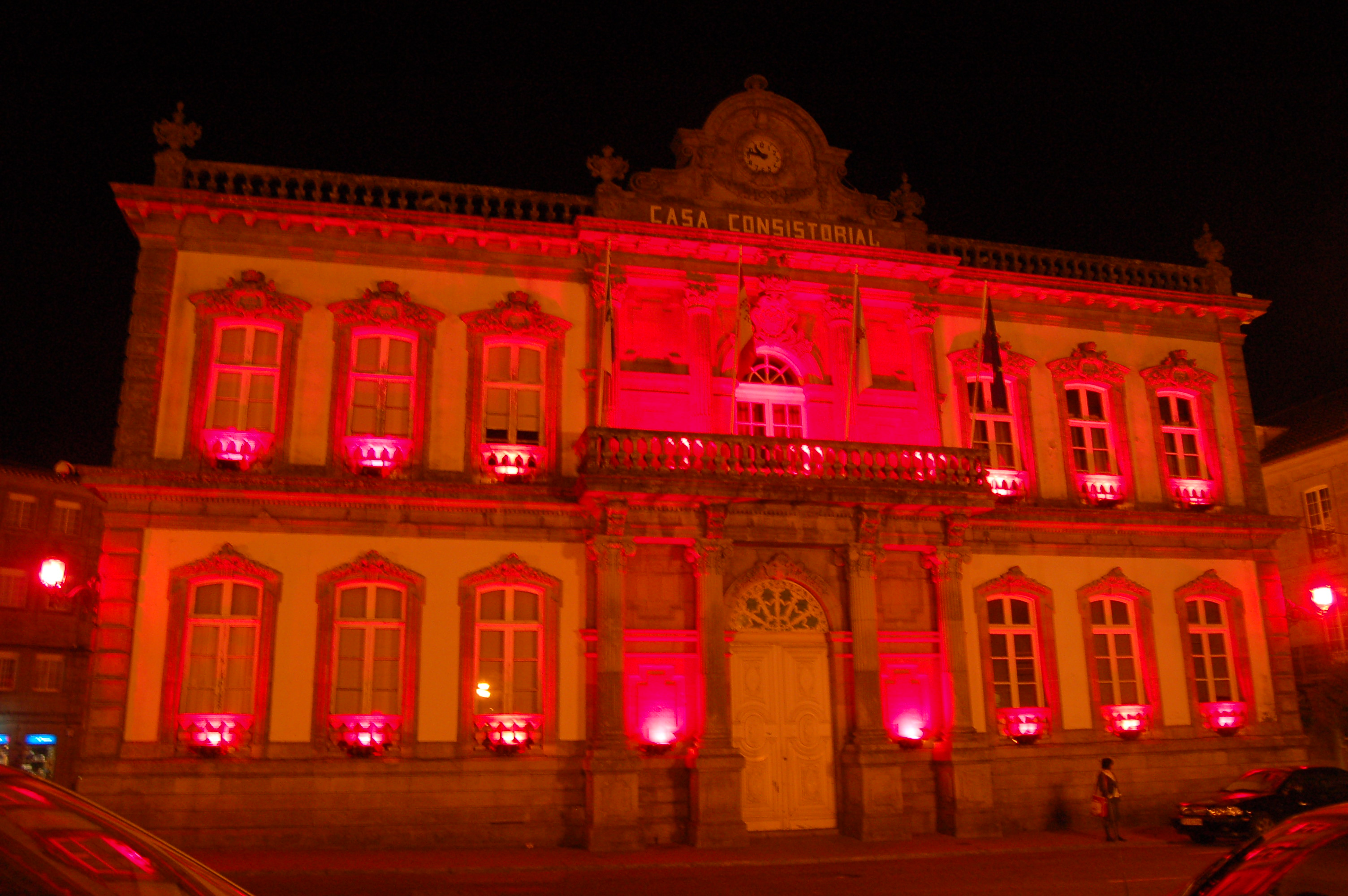 Concello de Pontevedra